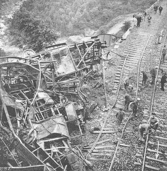 Blick vom Portal talaufwärts. Die Aufnahme wurde etwa 22 Stunden nach dem Unfall aufgenommen, also bereits nach dem Abräumen zur Freimachung des bergseitigen Geleises (im Bild mit Pfeil bezeichnet).